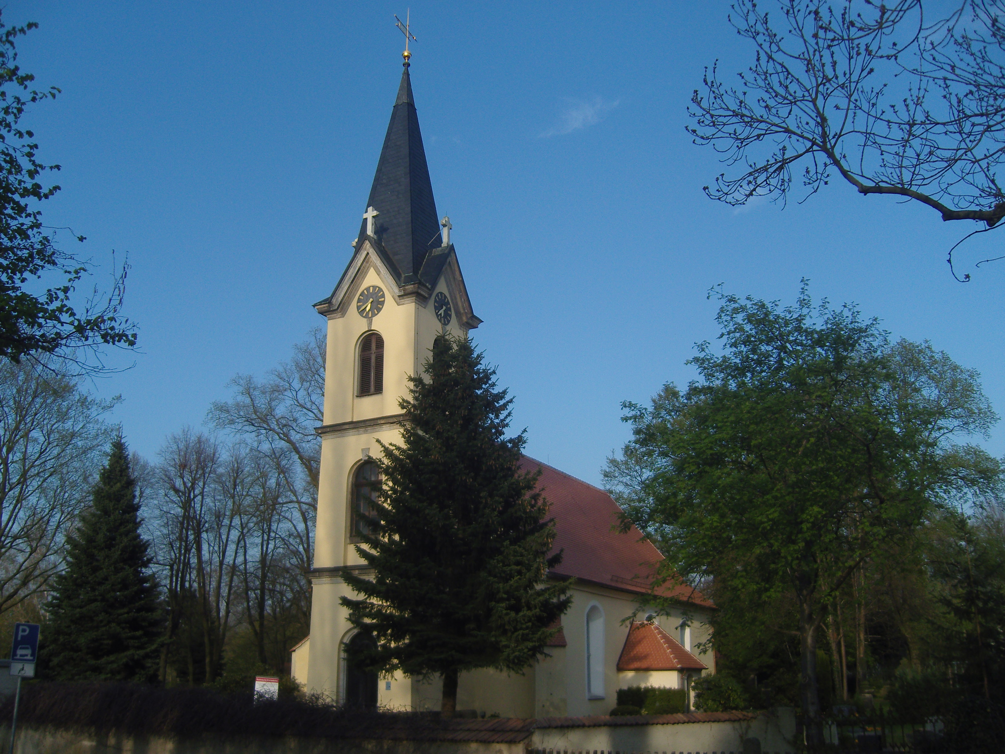 Kirche in Schwepnitz